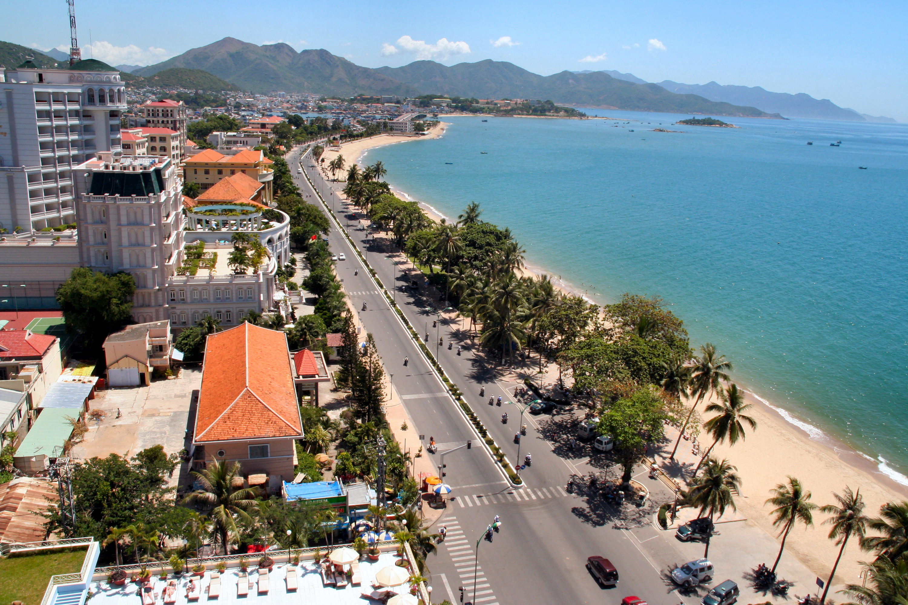 La rue Tran Phu avec la plage et les hotels